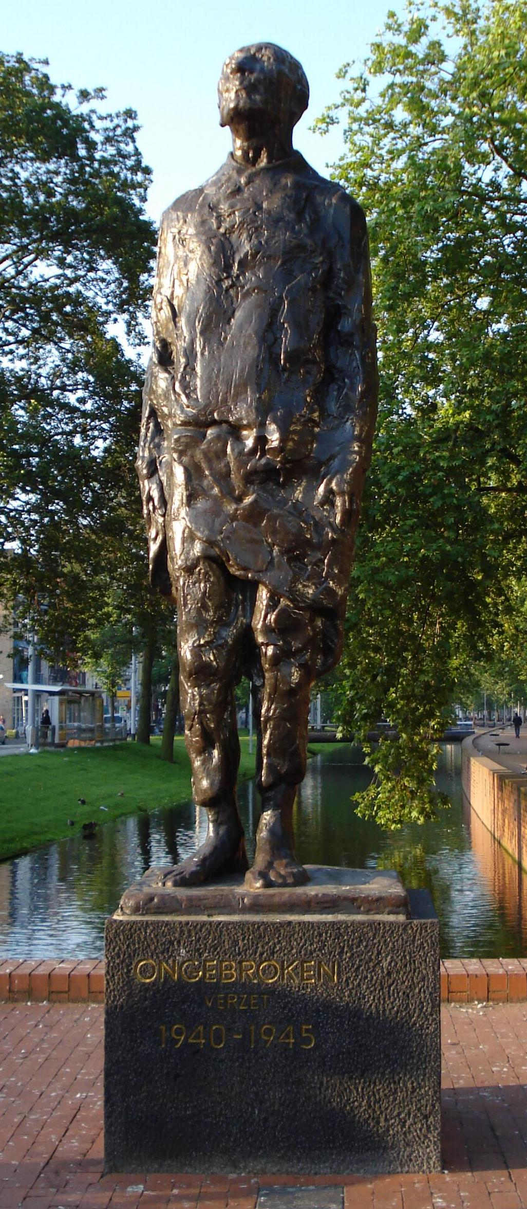 Rotterdam, Westersingel. Monument "Ongebroken verzet" van Hubert van Lith. Rotterdam/The Netherlands